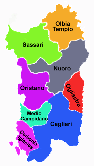 auteur:user:yugiz Représente les provinces sardes actuelles.